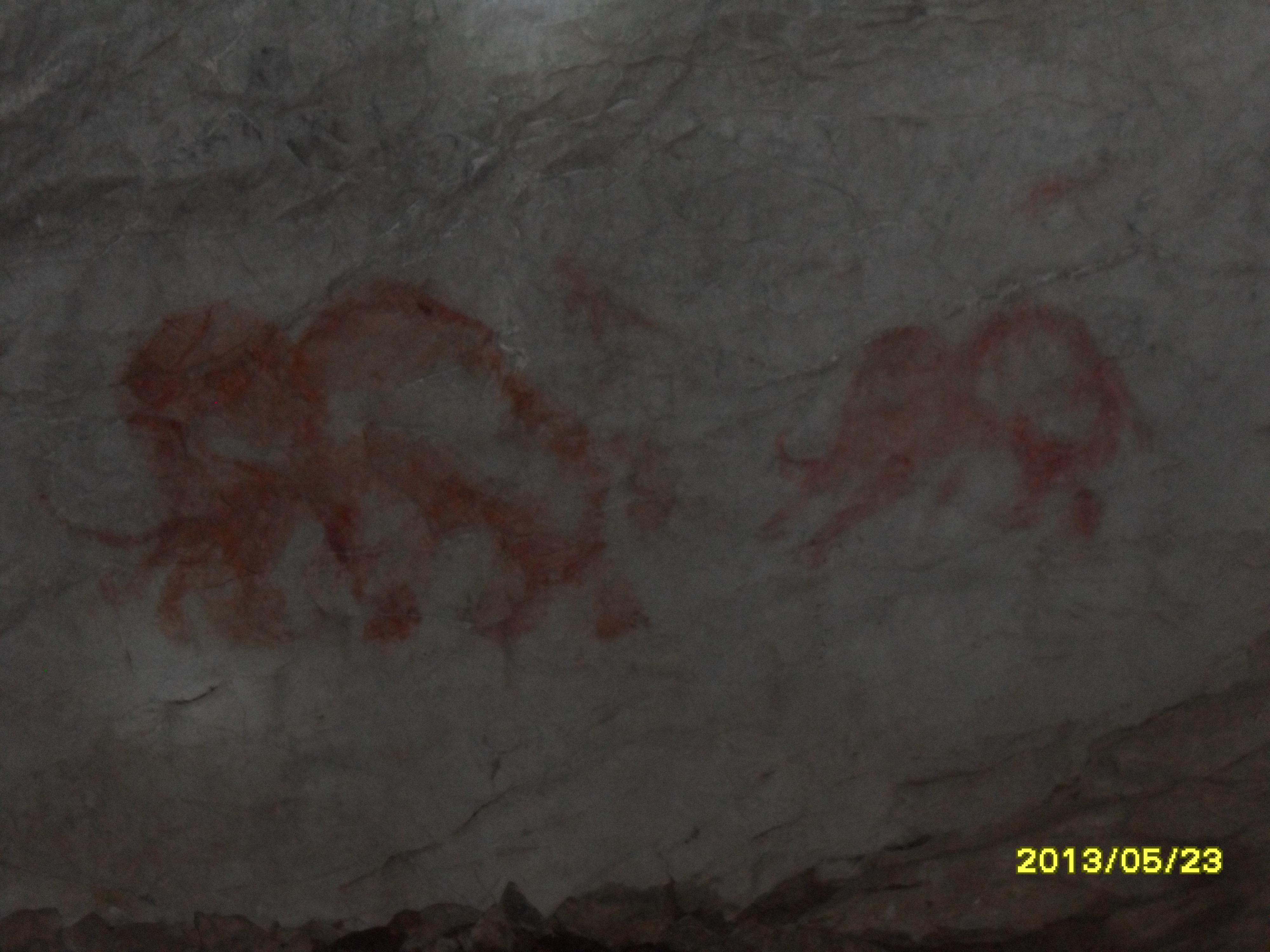 Капова пещера (Шульган-Таш), Бурзянский район This image is related to the protected area of Russia number 0220101